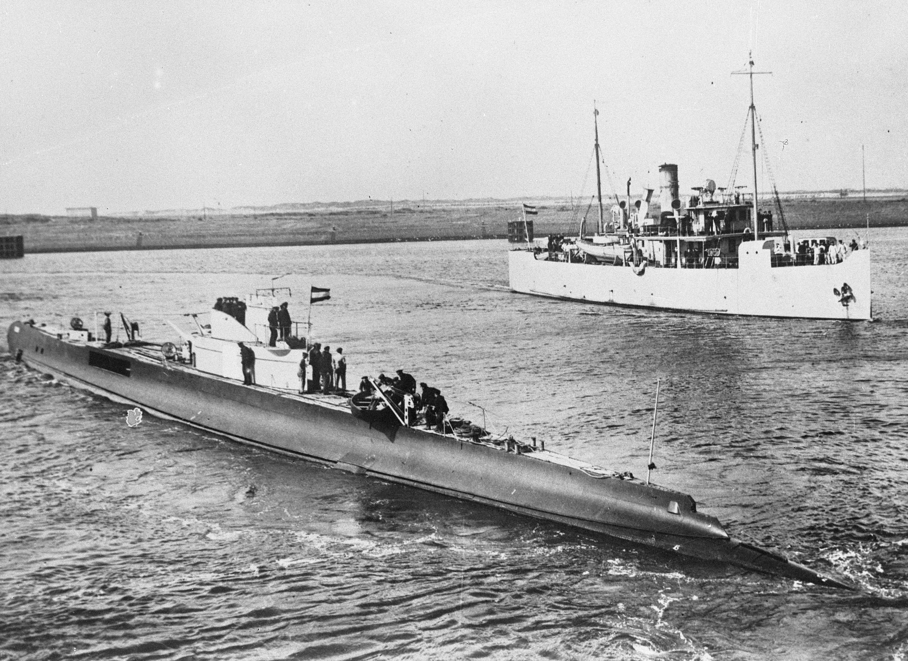 Collectie / Archief : Fotocollectie Anefo Reportage / Serie : NAVY [Navy] Anefo Londen serie Beschrijving : Mijnenlegger Hr. Ms. "Medusa" en de onderzeeboot Hr. Ms. "K 17" Datum : 1940-1942 Trefwoorden : marine, onderzeeers, oorlogsschepen, tweede wereldoorlog Fotograaf : Onbekend / Publiek Domein Auteursrechthebbende : Nationaal Archief Materiaalsoort : Glasnegatief Nummer archiefinventaris : bekijk toegang 2.24.01.09 Bestanddeelnummer : 935-0255